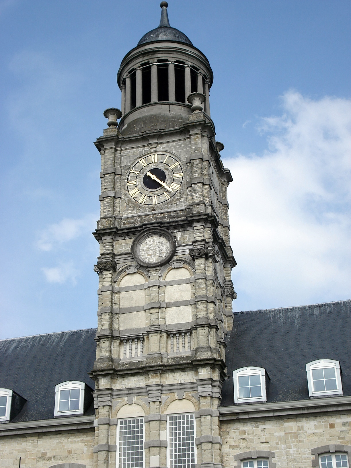 Sint-Bernardusabdij Hemiksem. Toren (begin 18e eeuw) in westgevel.